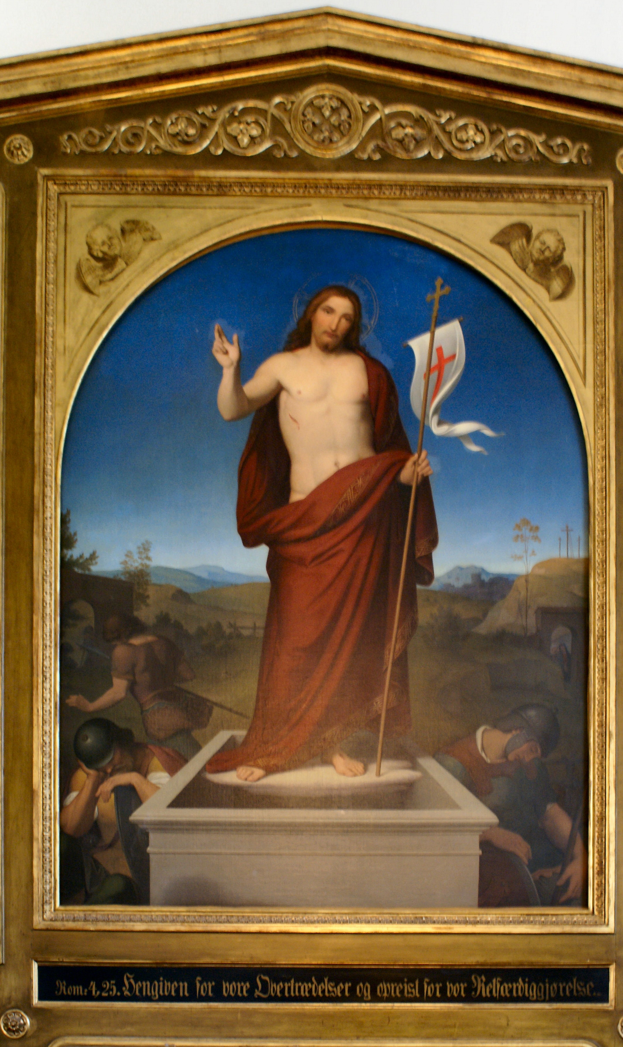 Ballerup Kirke,Glammelt alterbillede af Albert Küchler: Opstandelsen